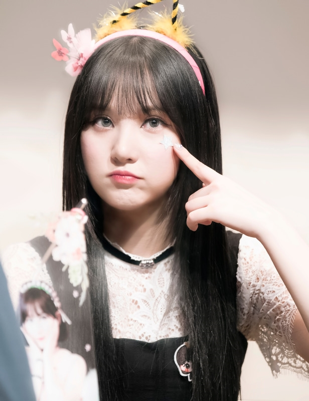 180505 명동 팬싸인회